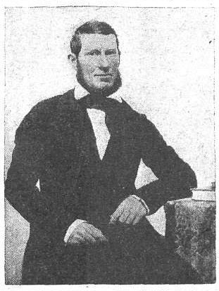 Guillermo Brown, hijo del almirante Guillermo Brown y su esposa Isabel Chitty.